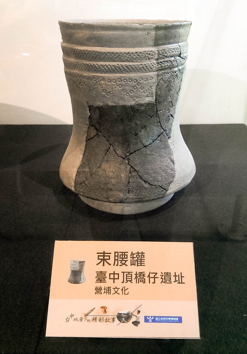 位於國立中興大學的頂橋仔遺址出土文物，保存在牛罵頭遺址文化園區內